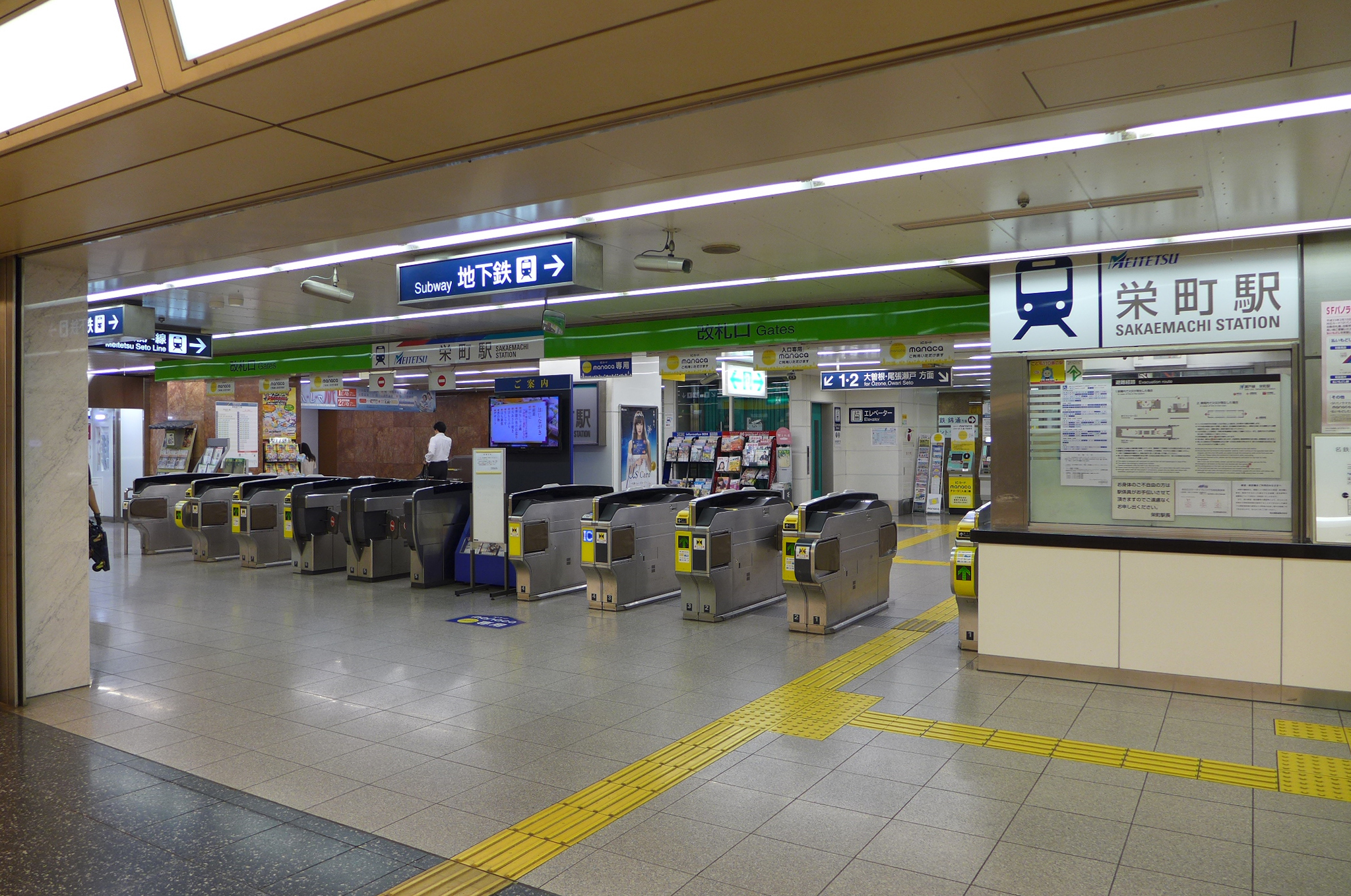 Meitetsu Sakaemachi Station